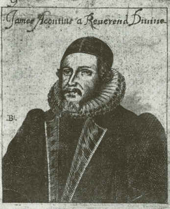 Jacopo Aconcio (ca 1500 - ca 1565)